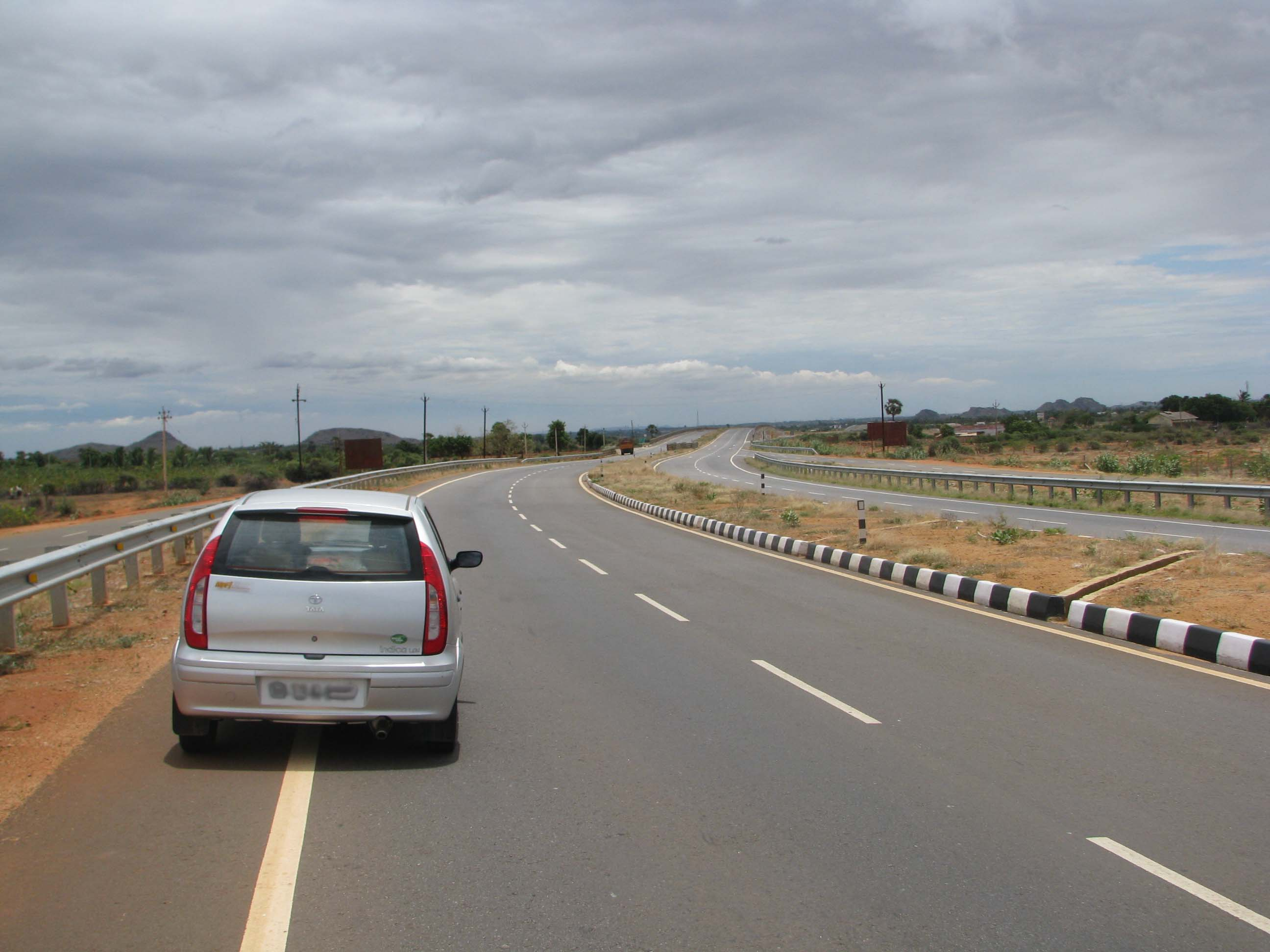 NH 7 from Kaniyakumari to Madurai